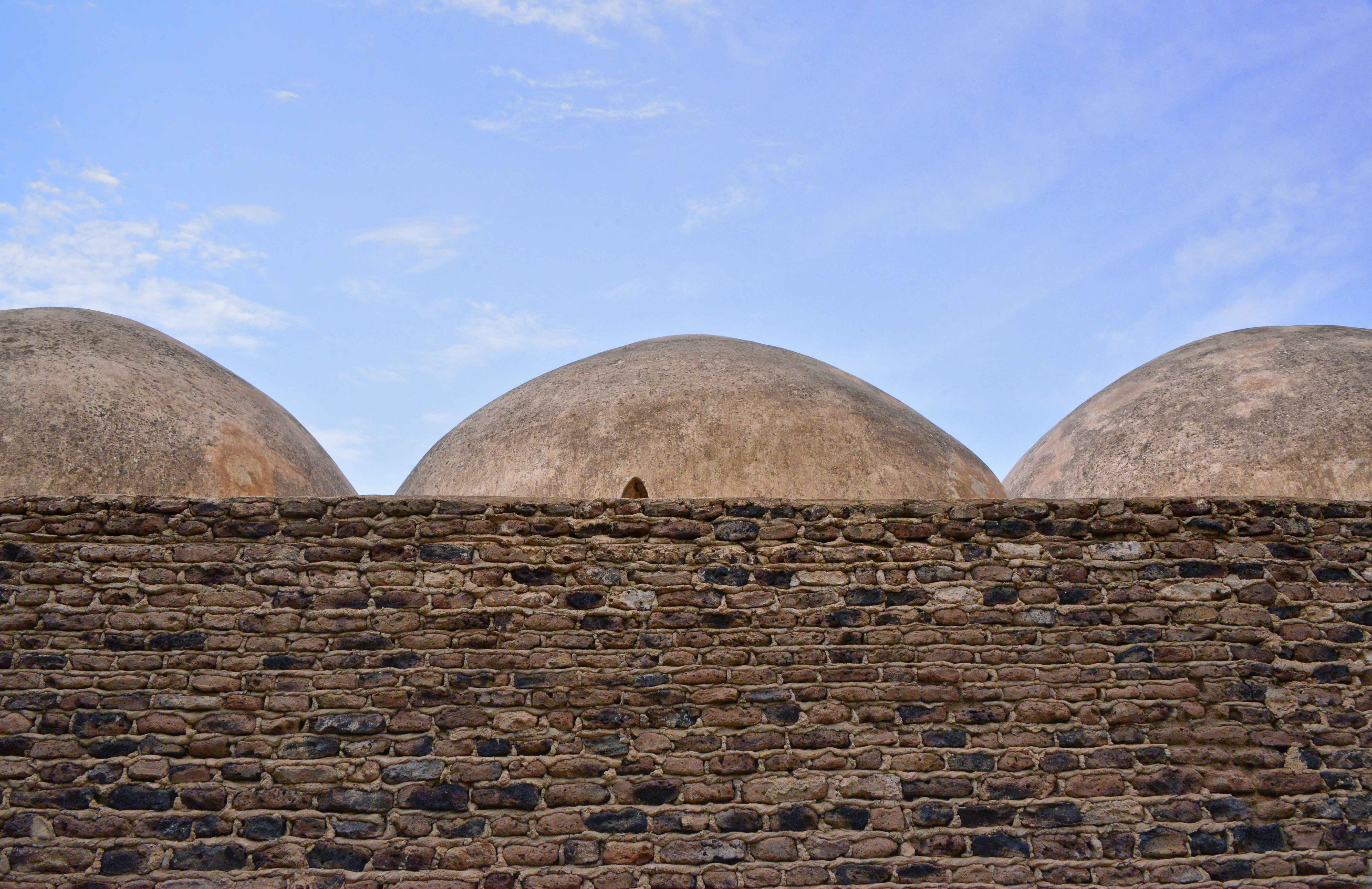 Yemen